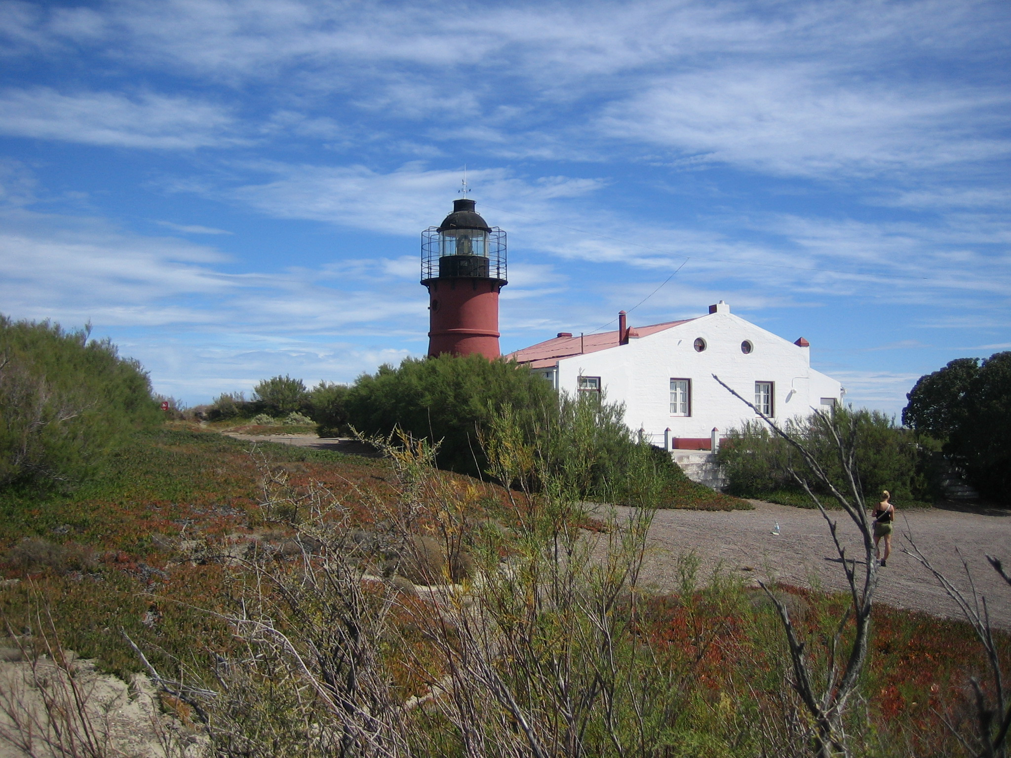 Von mir selbst aufgenommen und unter Public Domain gestellt.